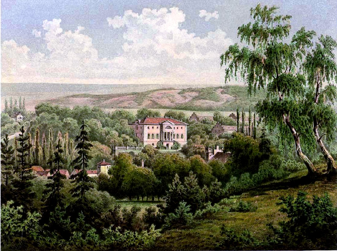 Schloss Helmsdorf, Mansfelder Seekreis, Provinz Sachsen, Lithografie aus dem 19. Jahrhundert